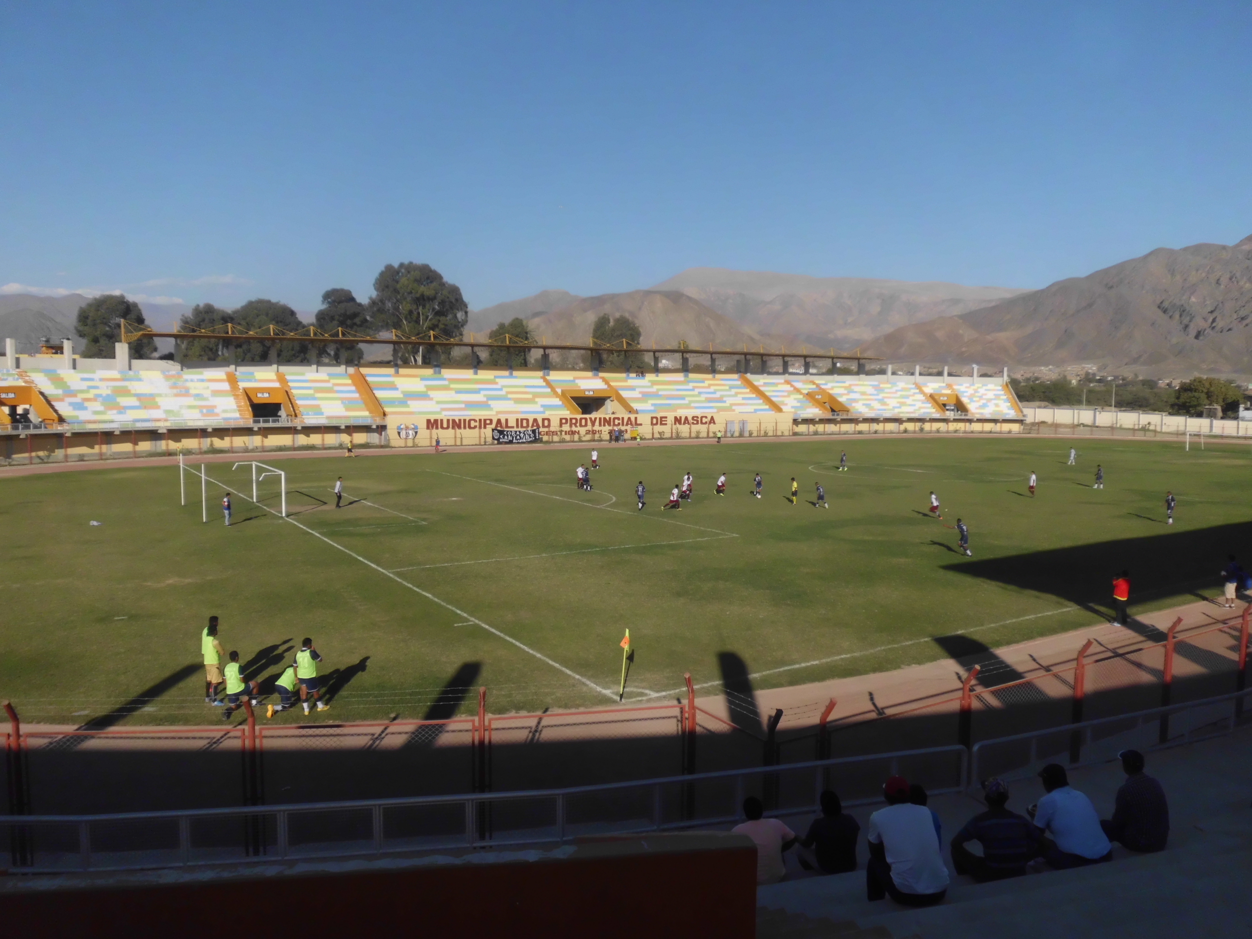 Gramado del estadio municipal de Nasca en el que se aprecia un partido por copa Perú de la etapa departamental de Ica.